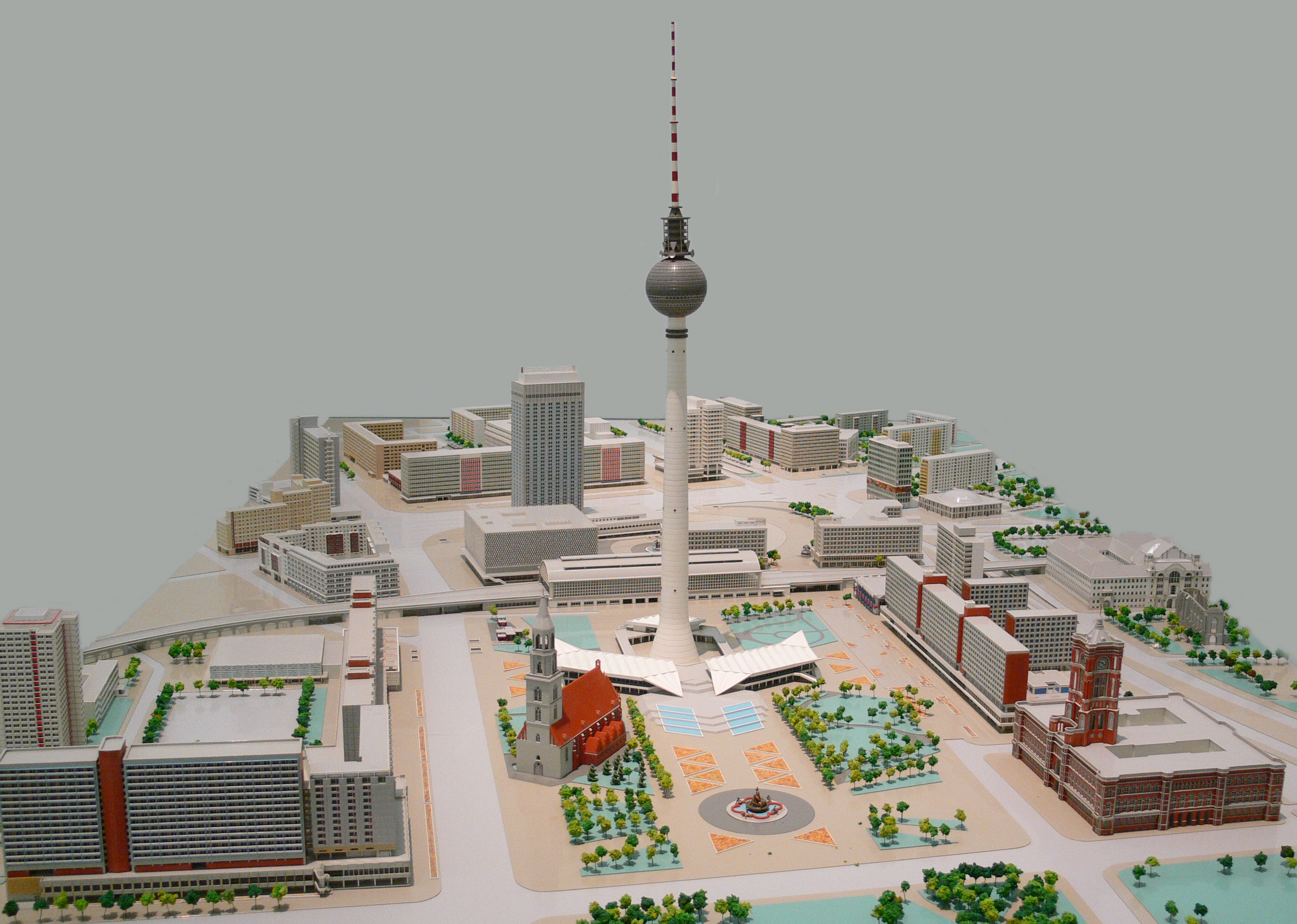 Berlinische Galerie, Berlin Berlin, Stadtmodell aus DDR-Zeiten Alexanderplatz und Marx-Engels-Forum mit Fernsehturm